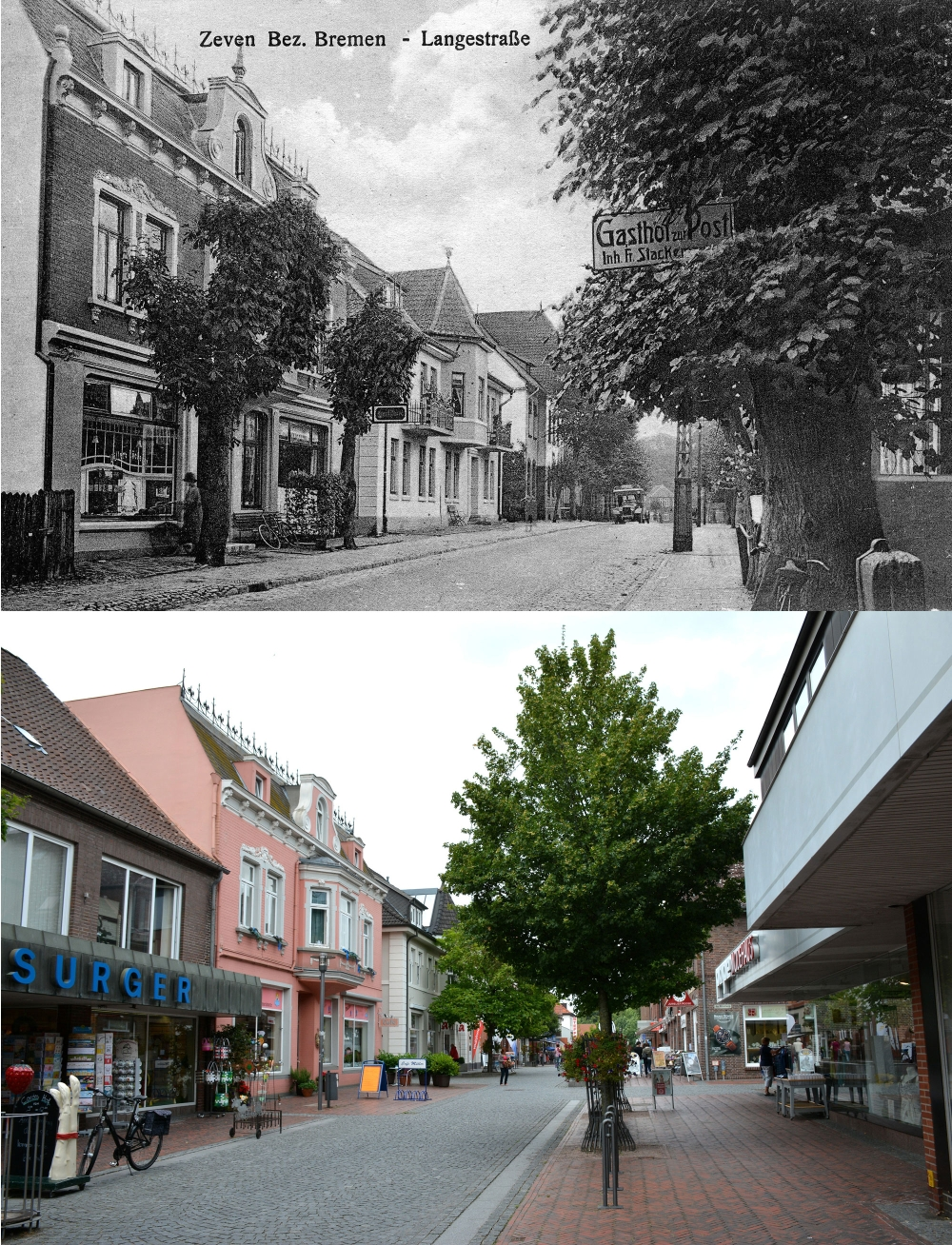 Lange Straße - Richtung Gaußplatz Zeven